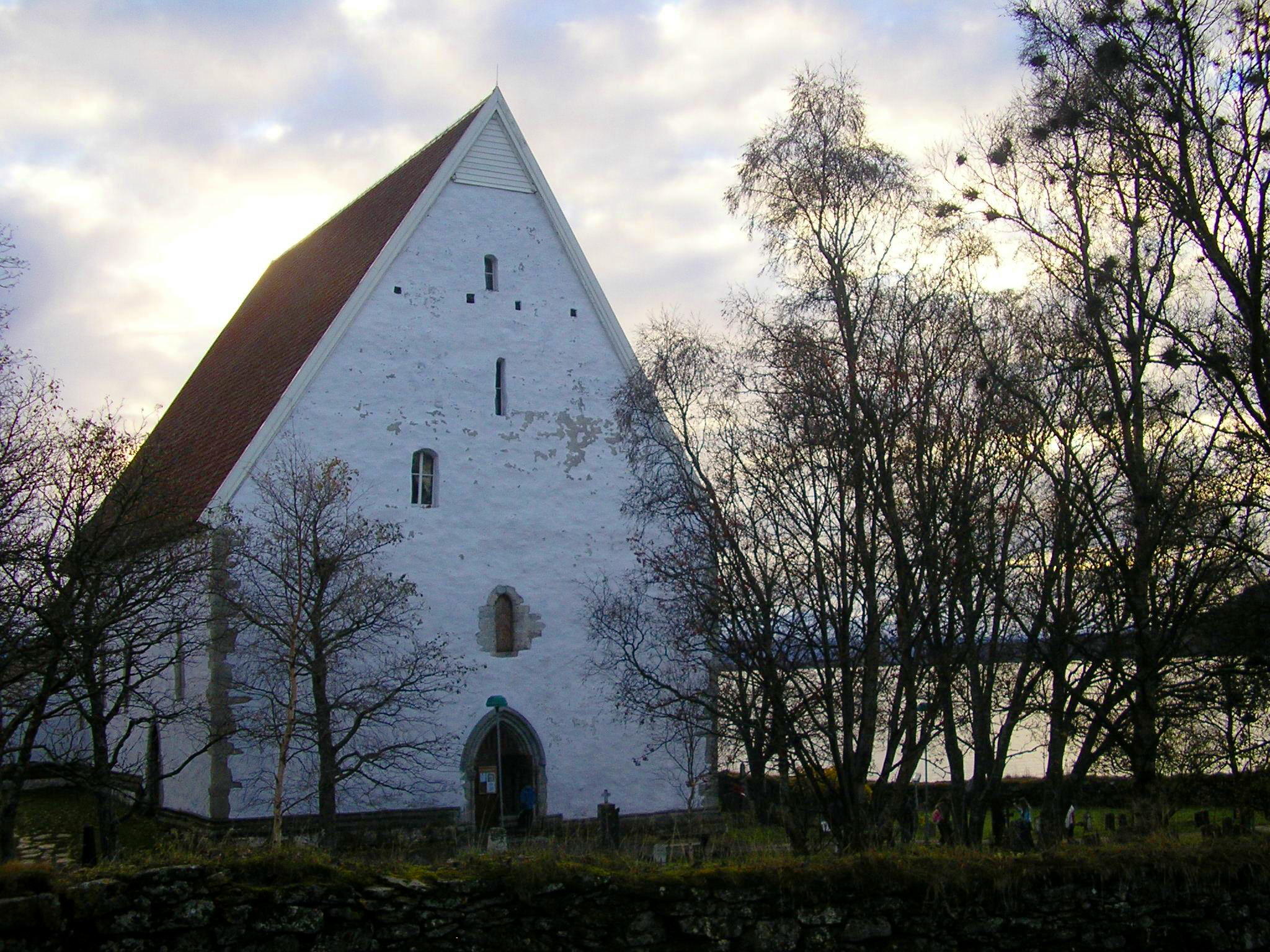 Trondenes Church